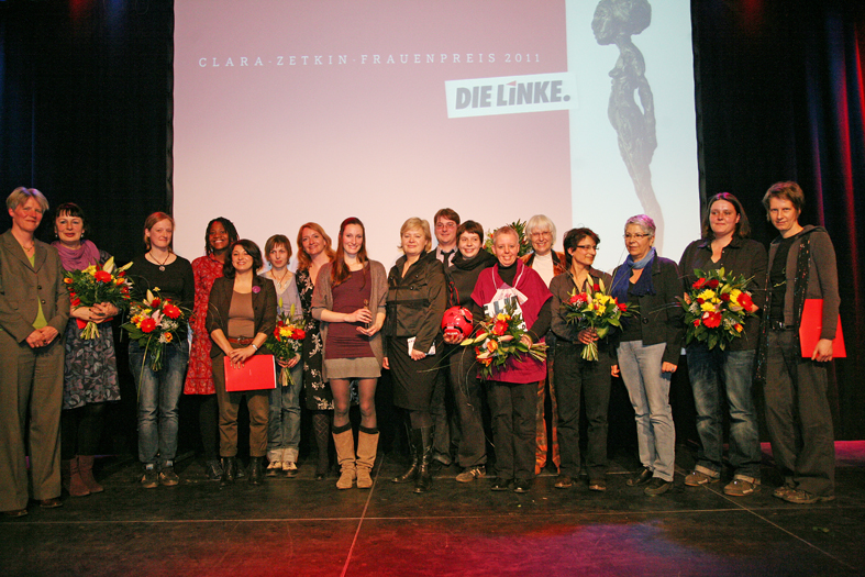 Anlässlich des 100. Jahrestages des Internationalen Frauentages vergab DIE LINKE am 12. März 2011 erstmals den Clara-Zetkin-Frauenpreis, um herausragende Leistungen von Frauen in Gesellschaft und Politik zu würdigen. Gewürdigt wurden sowohl eine aktuelle Initiative, in diesem Jahr das Projekt Discover Fußball, als auch das Lebenswerk einer Frau – ausgezeichnet wurde hier die freie Journalistin, Autorin, Publizistin und Dozentin Florence Hervé.